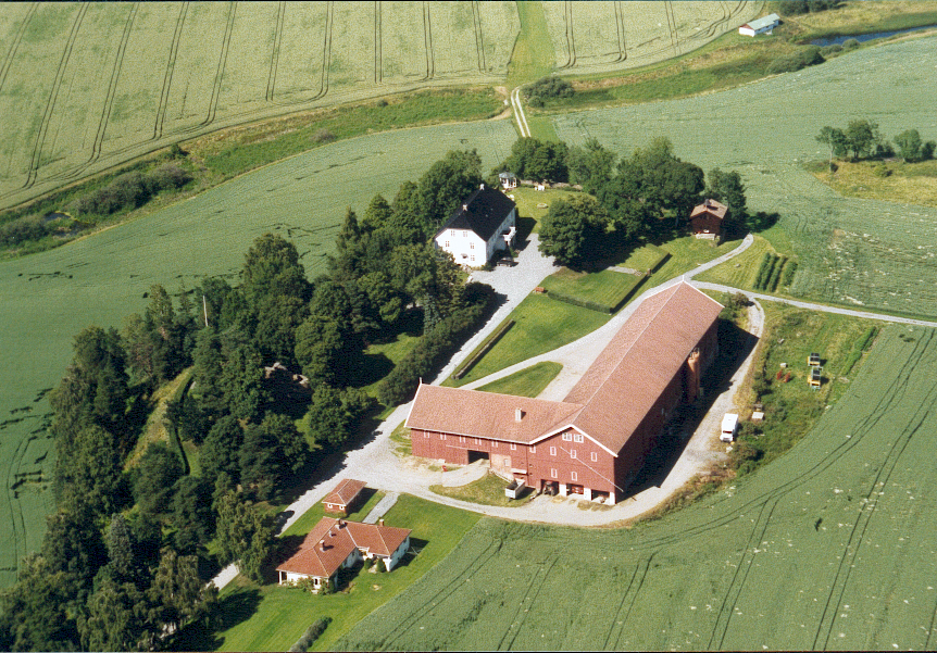 Stein gård i Hole